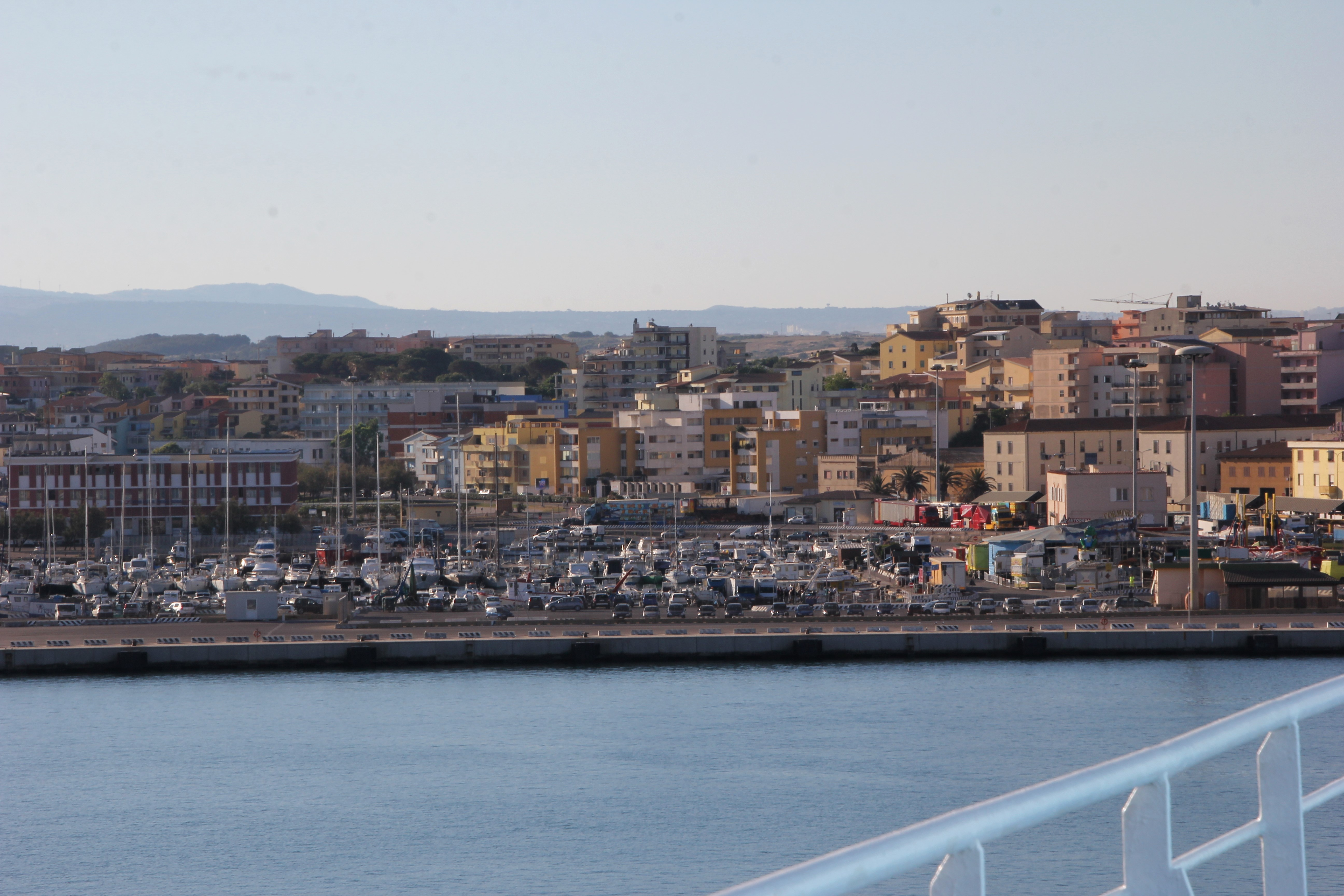 Porto Torres, panorama